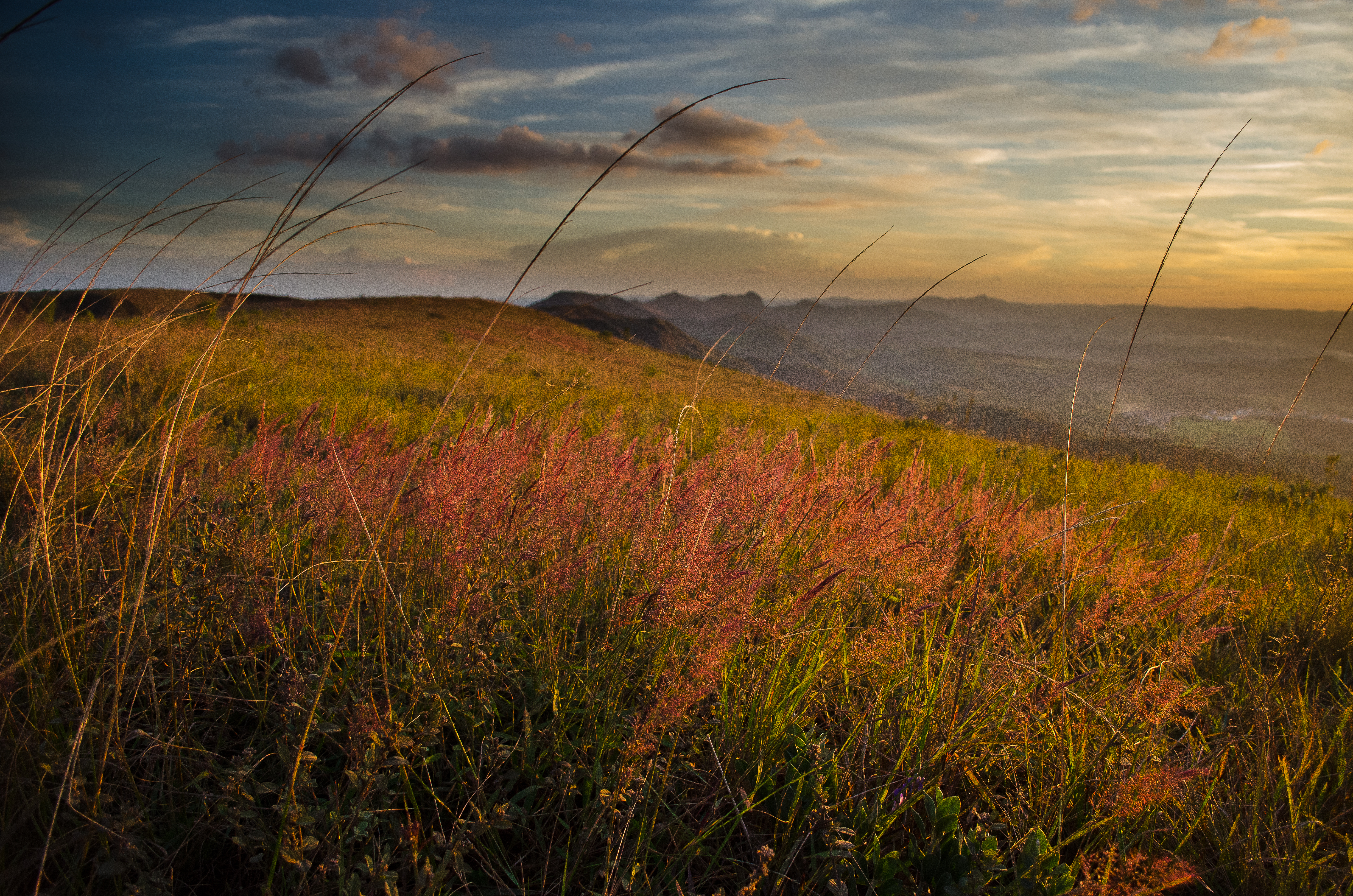 Vegetação na Reserva do Rola Moça (capim gordura)